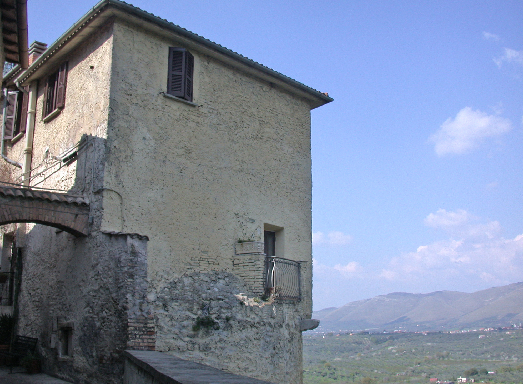 Italia, Lazio, provincia di Roma, Montelibretti, edificio sopra torre del castello Orsini